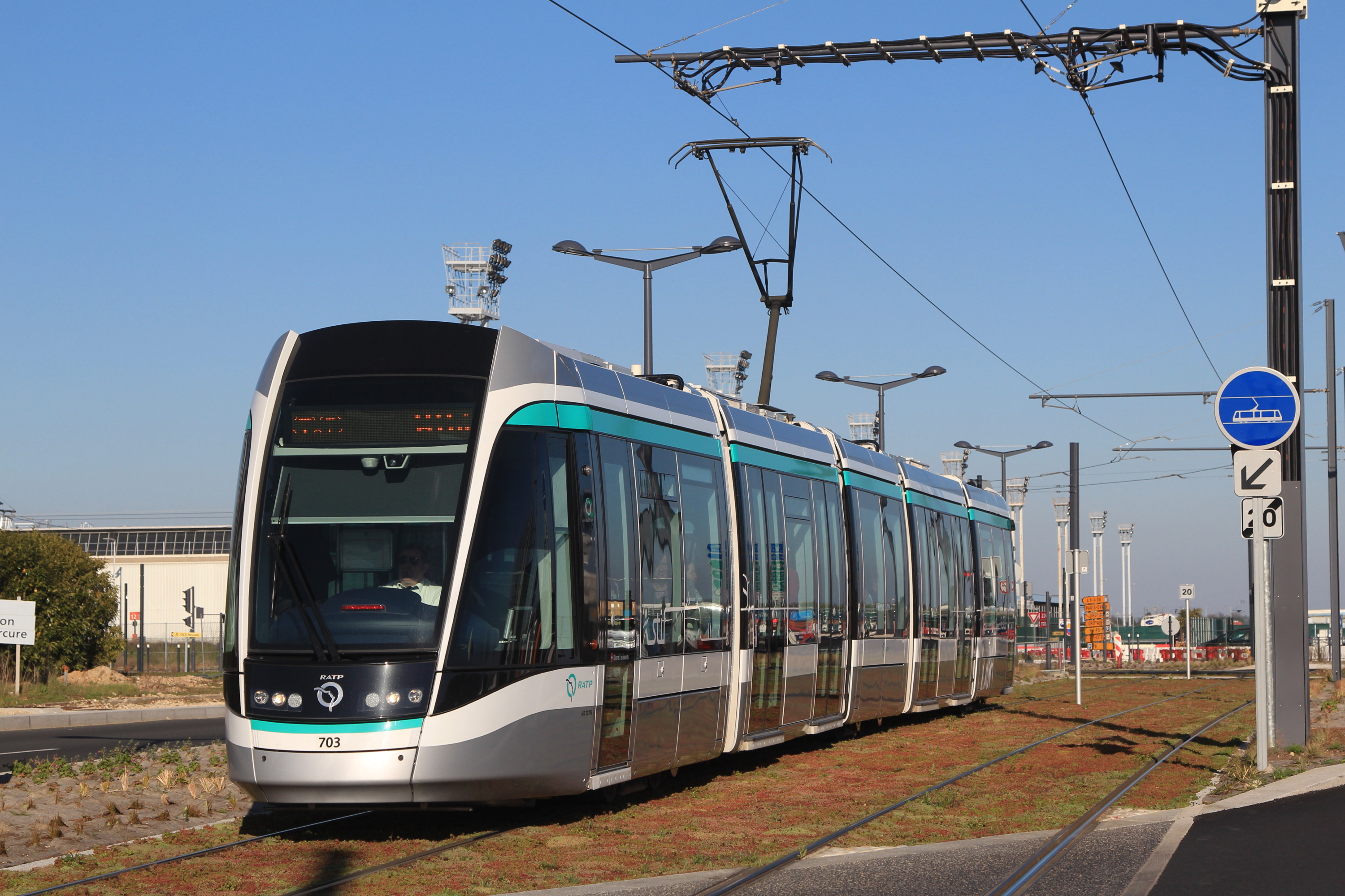 Rame Citadis de la ligne 7 du tramway d'Île-de-France, entre les arrêts Cœur d'Orly et Aéroport d'Orly.